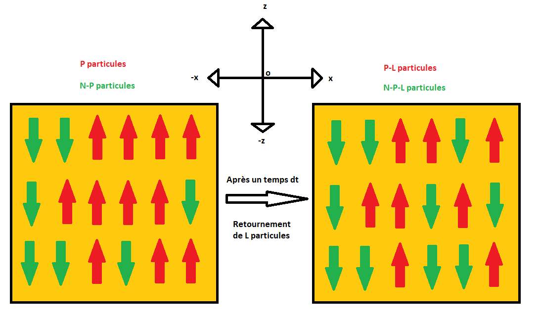 Renversement